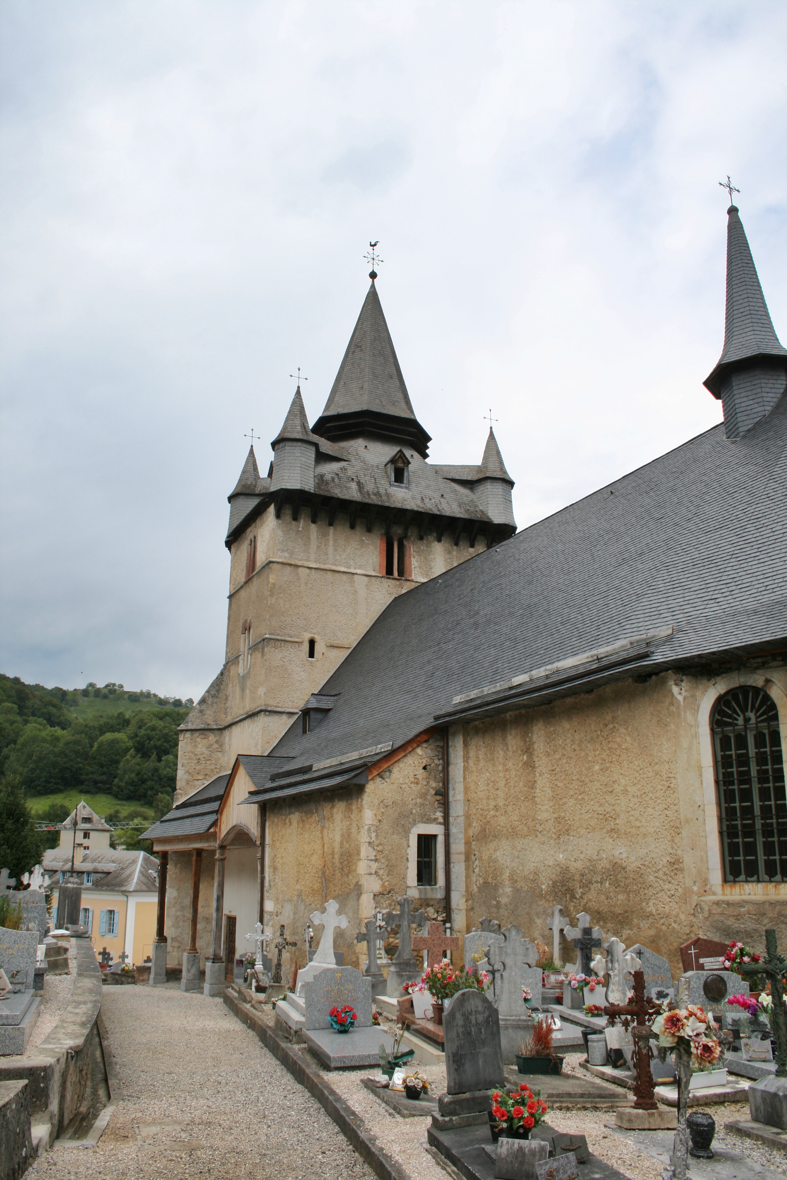 Église et cimetière de Beaudéan, dans les Hautes Pyrénées